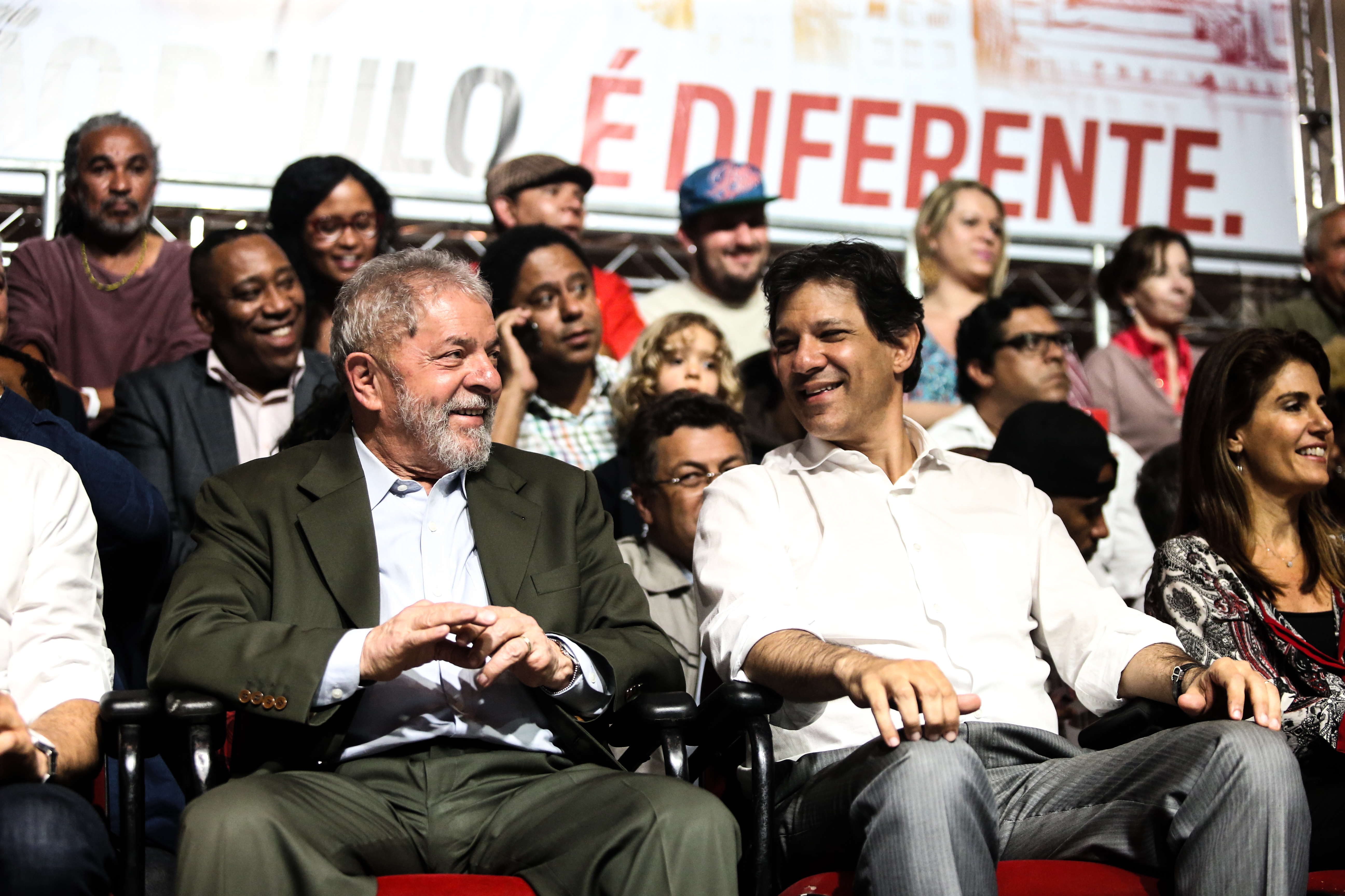 São Paulo 27/09/2016 Ex-Presidente Lula com Fernando Haddad na Casa de Portugal. Foto Pauo Pinto/Agencia PT